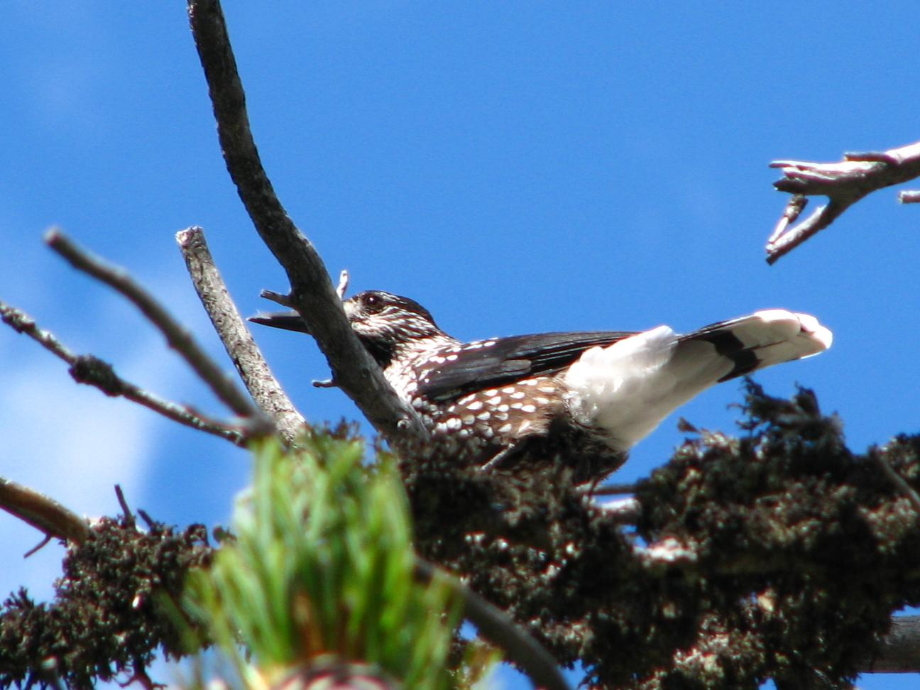 Tannenhäher Nucifraga caryocatactes auf einer Arve Pinus cembra im Aletschwald.